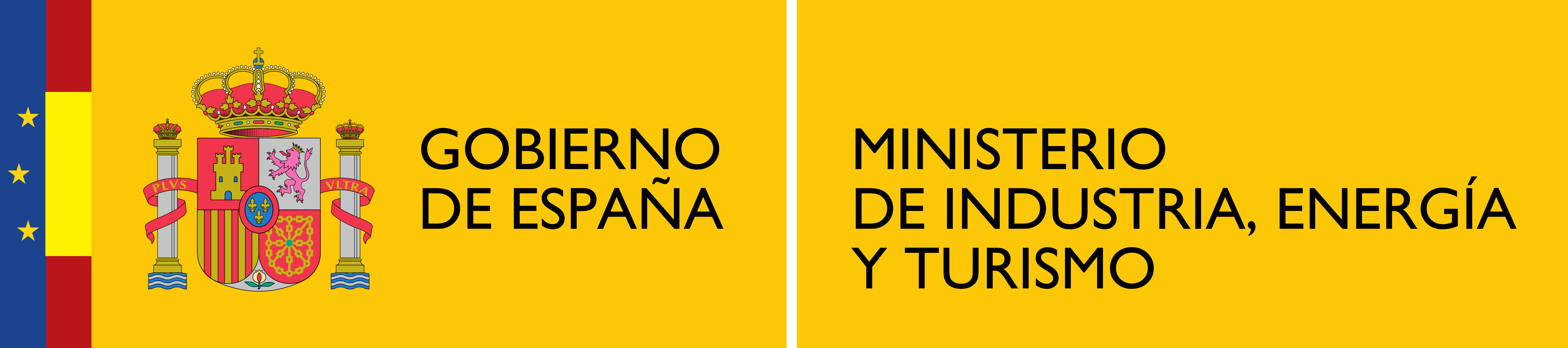 Logotipo del Ministerio de Industria, Energía y Turismo